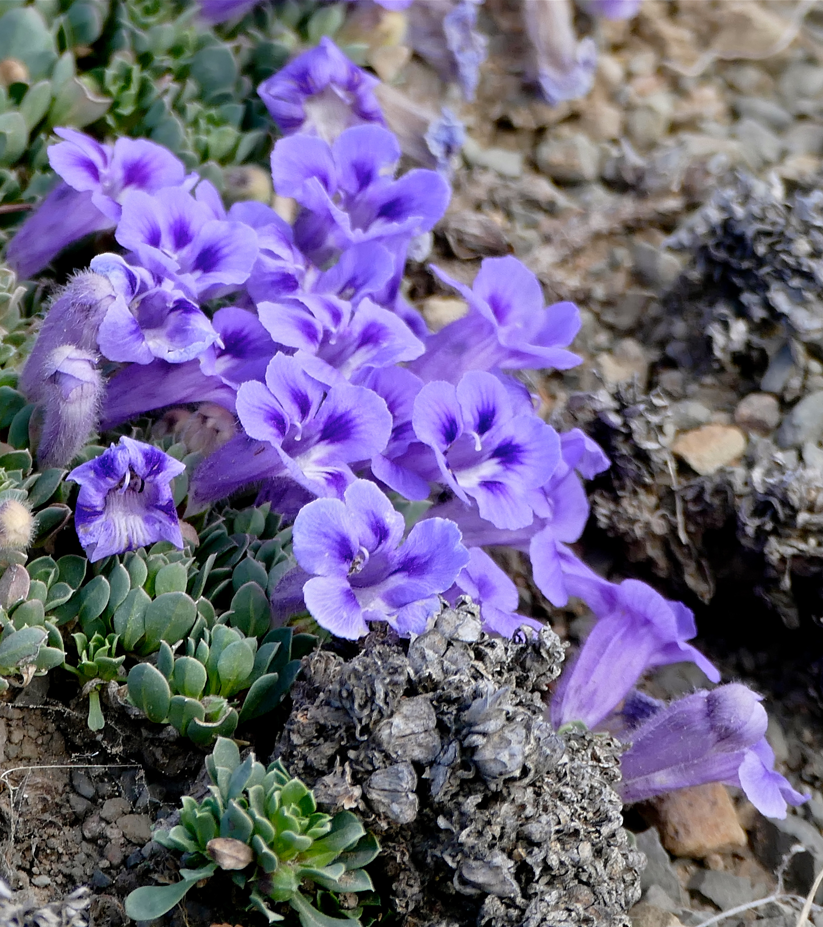 Kranskop Loop, Mountain Zebra NP, Eastern Cape, SOUTH AFRICA